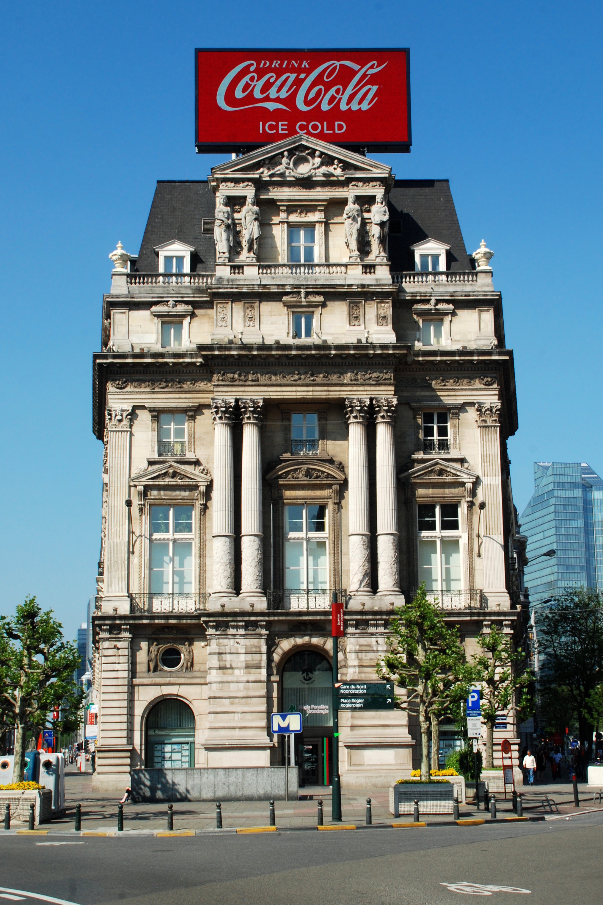 Belgique - Bruxelles - Hôtel Continental (architecte Eugène Carpentier, 1873)